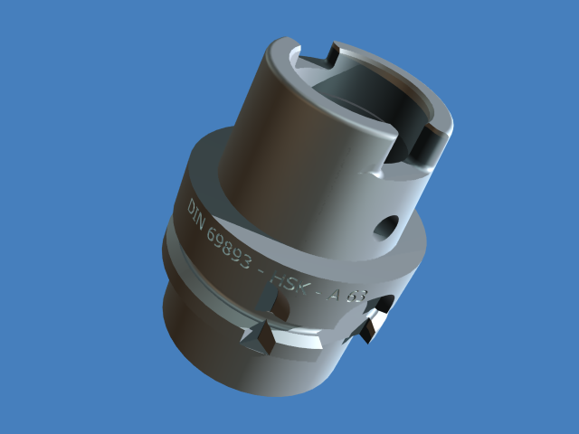 Hohlschaftkegel Typ A nach DIN 69893 - HSK - A63